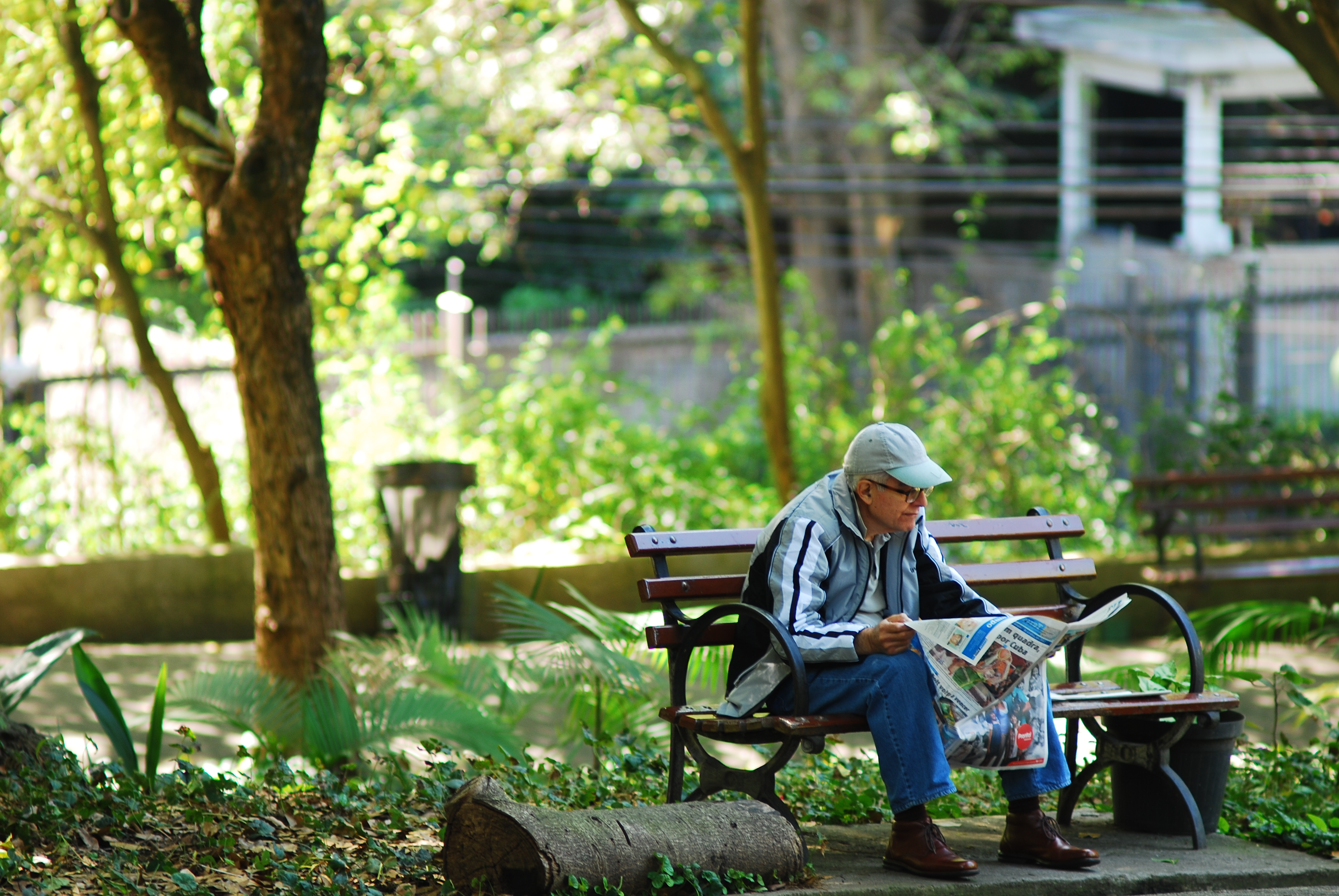 Parque Buenos Aires - Higienópolis São Paulo / SP